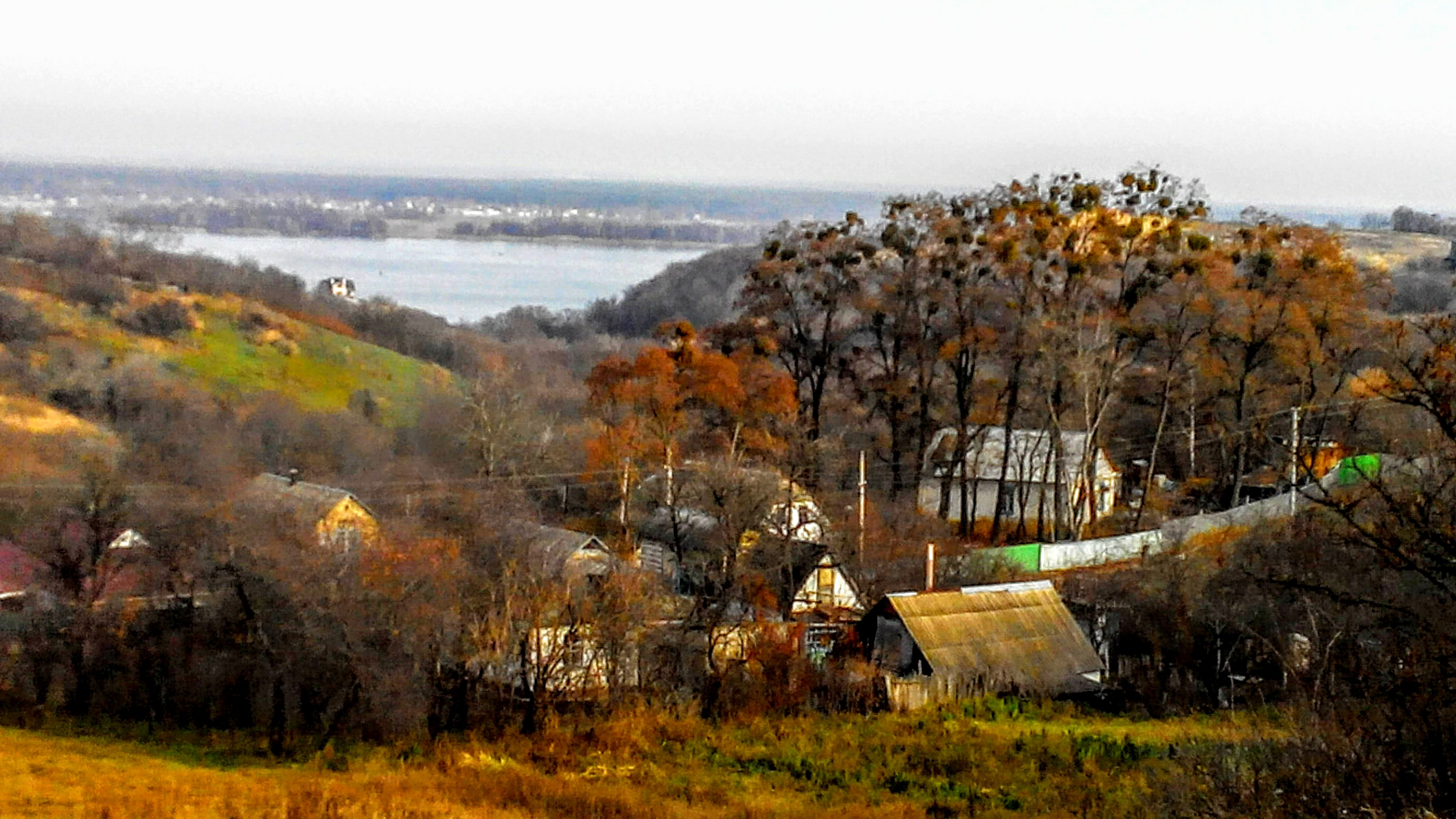 Історична частина села Витачів Обухівського району Київської області